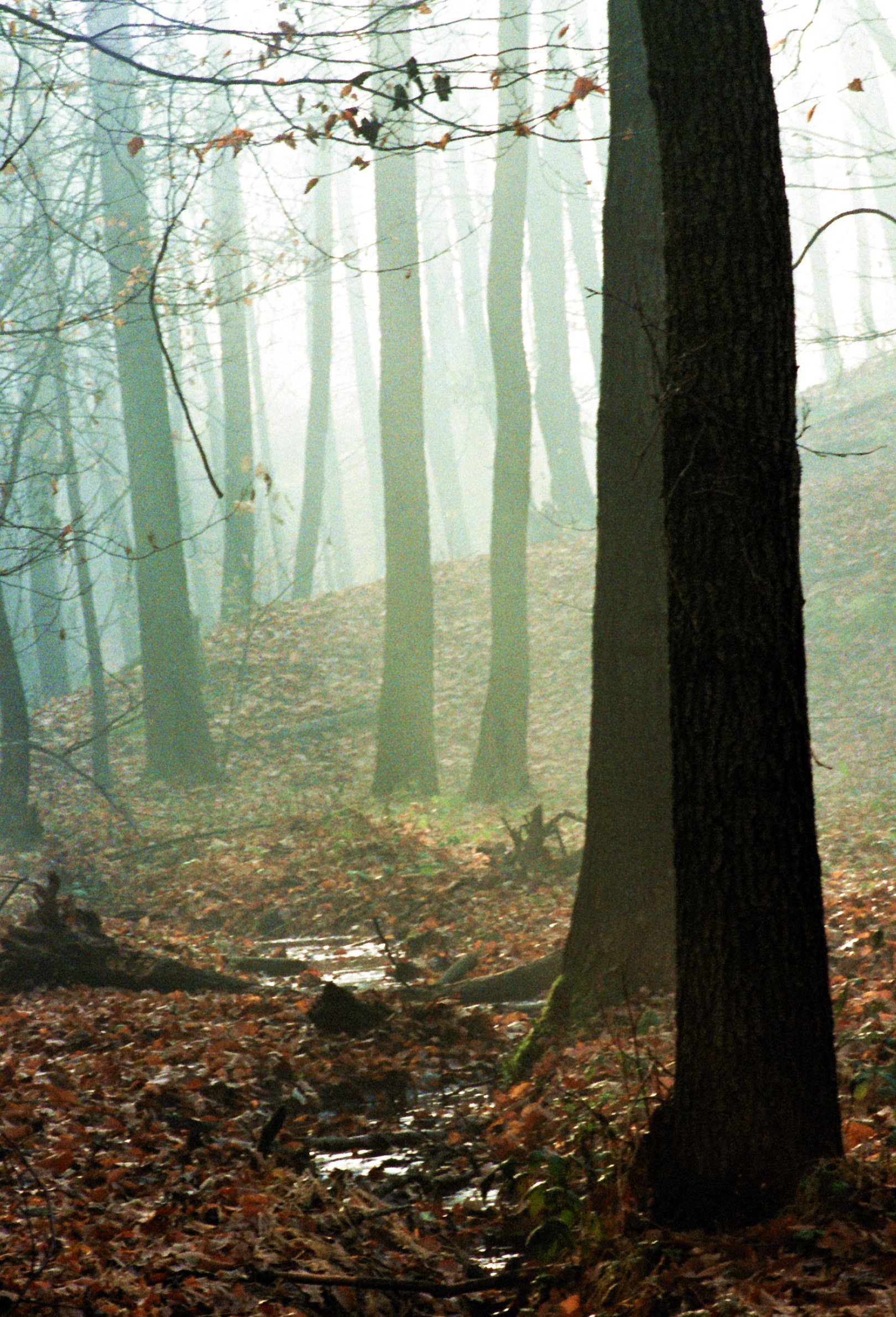 Las Kyndra w Jastrzębiu Zdroju znajduje się na terenie pagórkowatym pomiędzy centrum a dzielnicą Bzie Zameckie w miejscu gdzie istniały dawniej stawy hodowlane, w wielu miejscach istnieją wciąż dawne ziemne groble. Las jest mieszany, z drzew liściastych pospolite są brzozy, dęby, buki, a z iglastych świerki. Fauna m.in.: lisy, sarny, jastrzębie, dzięcioły, kukułki.